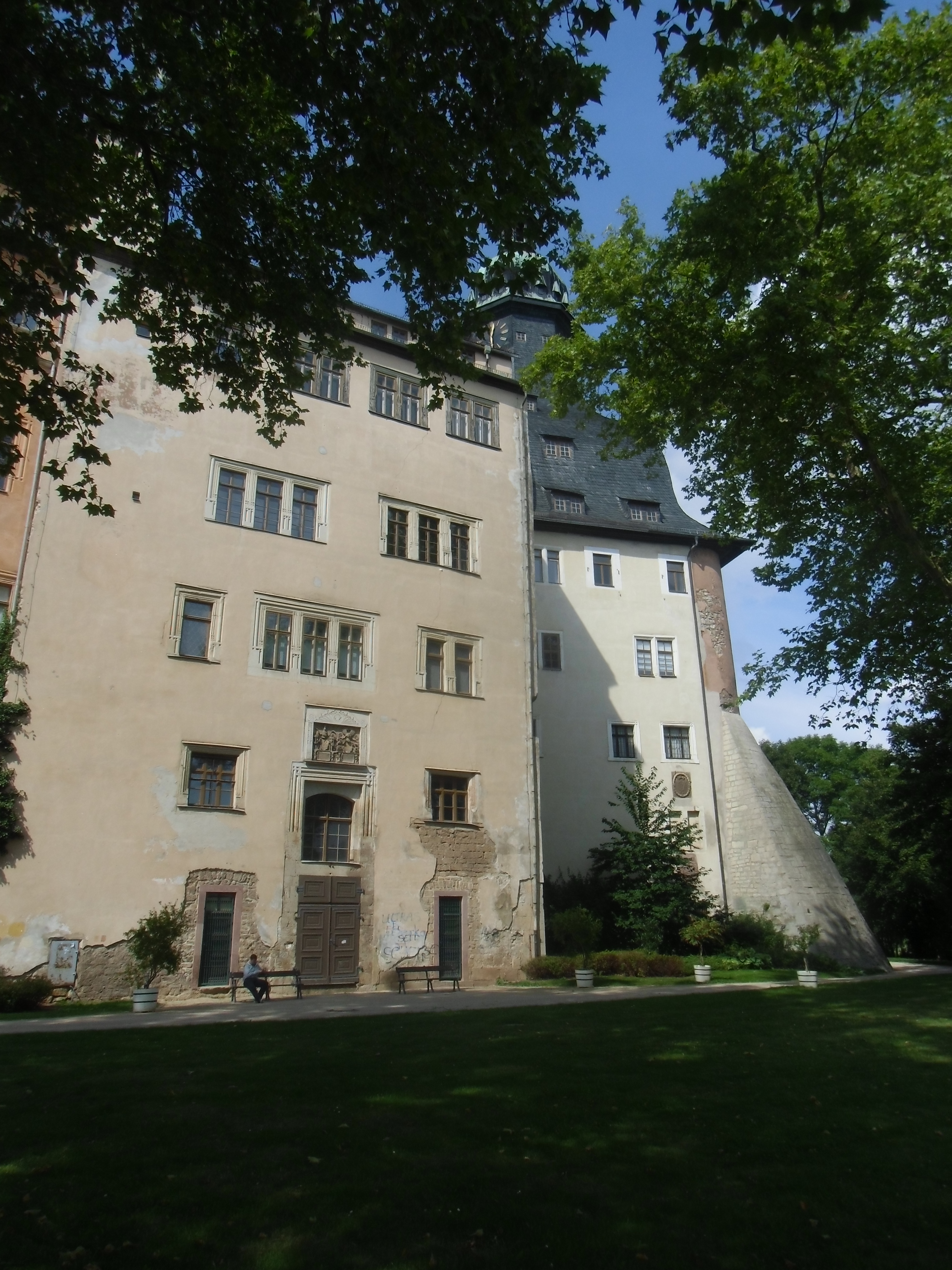 Schloss war Sitz der Fürsten von Schwarzburg-Sondershausen, der alte Nordflügel entstand im 17. Jahrhundert